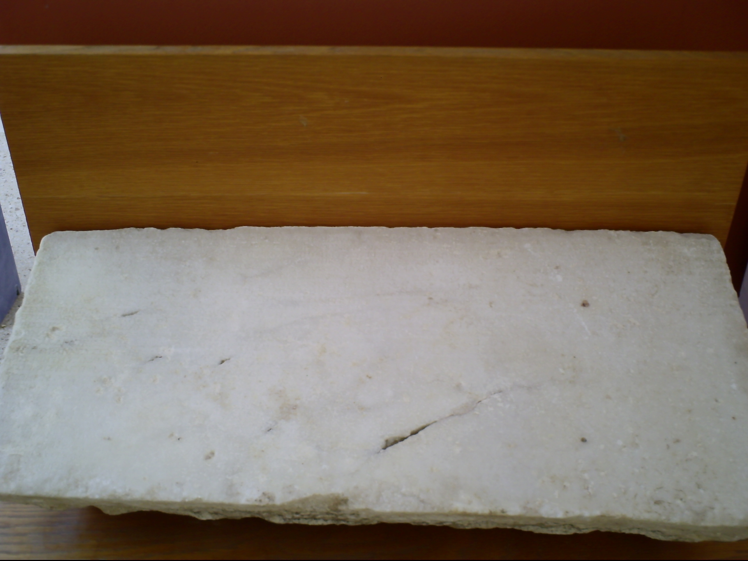 Fragment de la chronique de Paros (Musée archéologique de Paros A26)